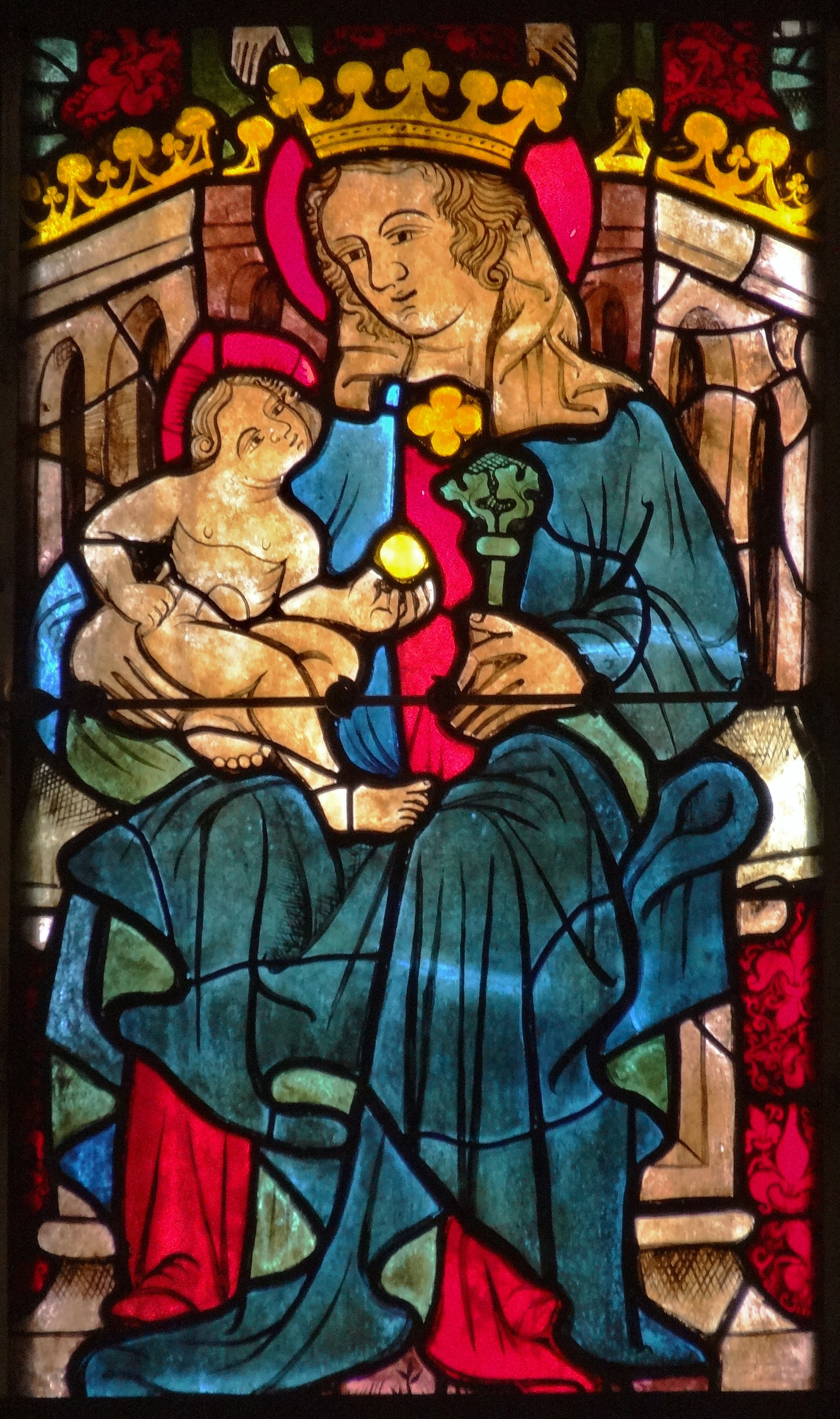 Kath. Pfarrkirche St. Leonhard im Lavanttal, Glasmalerei, Fenster im Südschiff, Teilansicht (um 1400)